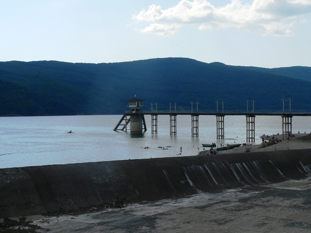 სიონის წყალსაცავი